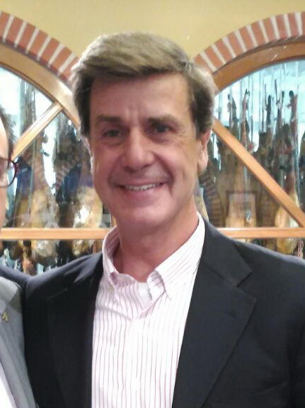 Decía Fernando Savater que «Para las carreras de caballos no aplico ninguna ciencia y menos aún la filosofía. Solo el corazón, como hizo Shakespeare en sus ’Trabajos de amor perdidos’». En #LaAntigua somos gente que tiene mucho corazón y, por eso, participamos en la presentación de las Carreras de Sanlúcar de Barrameda 2016, que se celebró el 27 de mayo en Guijuelo, en las instalaciones de Julián Martín, junto a la Sociedad que gestiona las carreras, Bodegas Barbadillo, la Casa de Alba y el Ayuntamiento de Guijuelo. Allí estuvo #LaMesaDeLaAntigua presente y queremos que vosotros lo estéis también!